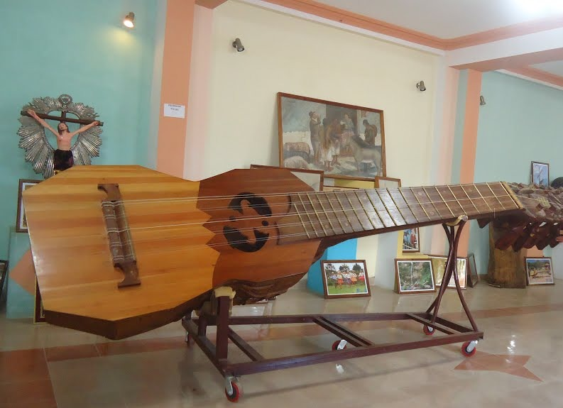 Charango más grande del mundo ubicado en el museo "Mauro Núñez" en Villa Serrano, Departamento de Chuquisaca, Bolivia.